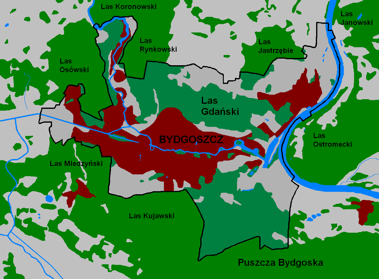 Lasy wokół Bydgoszczy wg topografii miasta - 2012